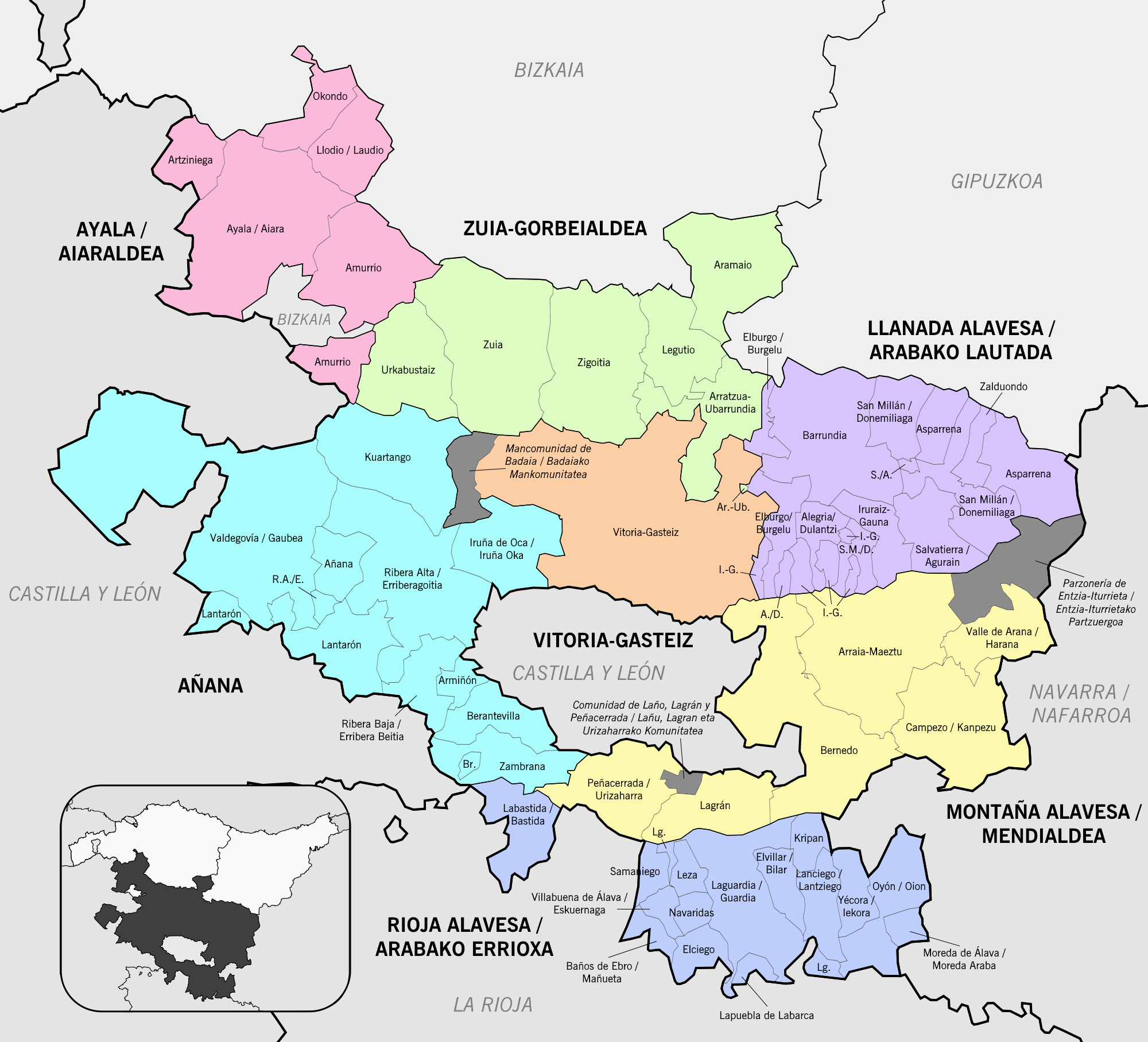 Municipios y comarcas de Álava, actualizado a 2017 / Arabako udalerri eta eskualdeak, 2017 urtean eguneratua